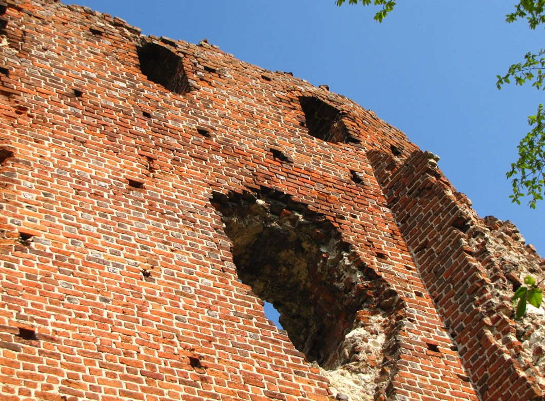 Bochotnica - ruiny zamku wraz z Górą Zamkową {zabytek nr rejestr. A/449 z 24.03.1970)